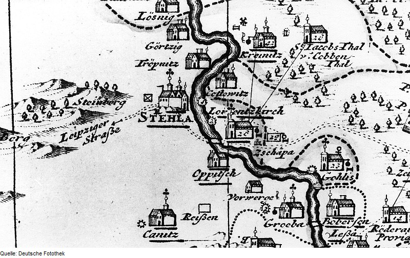 Original image description from the Deutsche Fotothek Strehla. Karte des Amtes Großenhain, von Zürner, 1711, Nachträge 1730 (Sign.: VII 108)